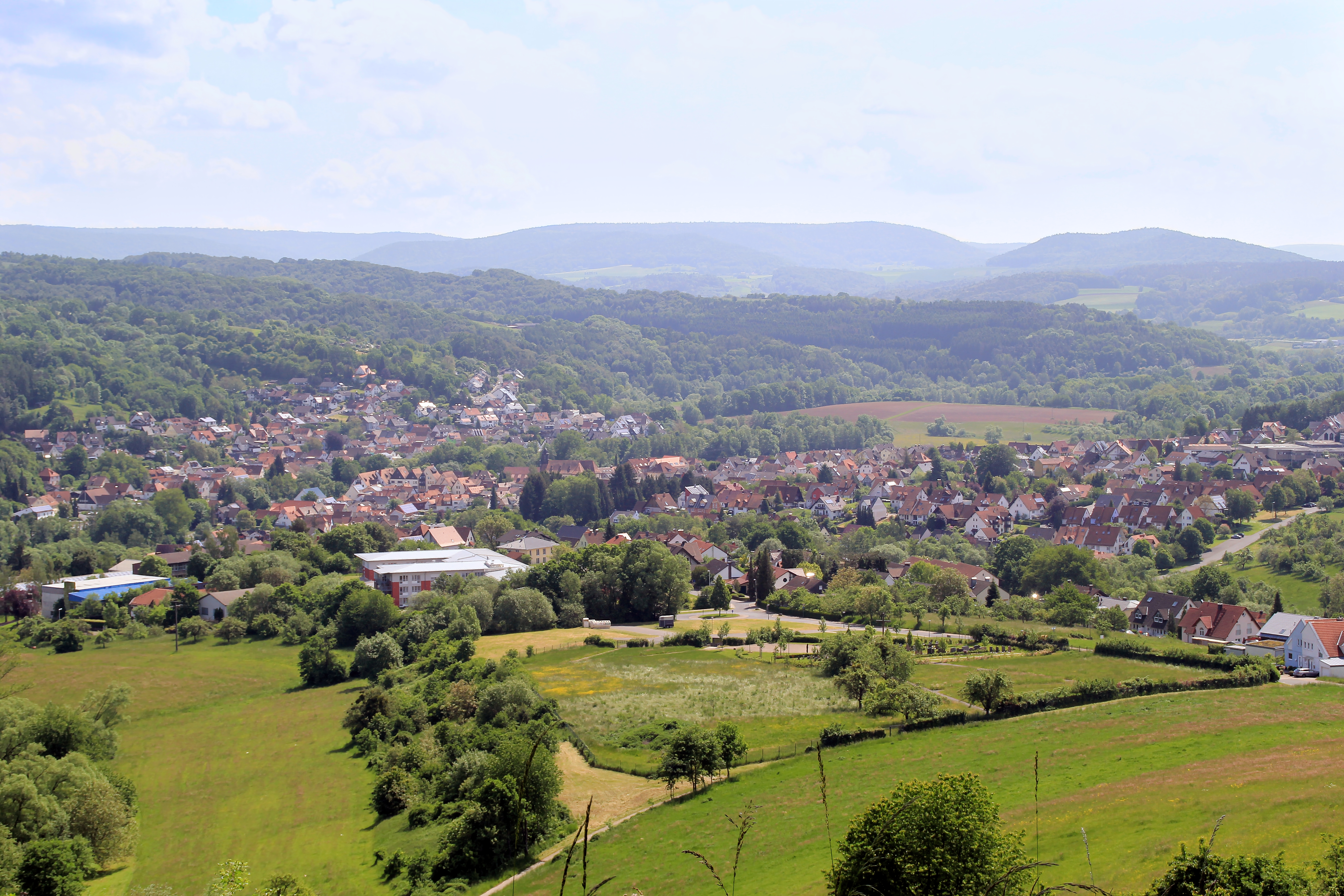 Mömbris und Mensengesäß vom Bauersberg aus gesehen